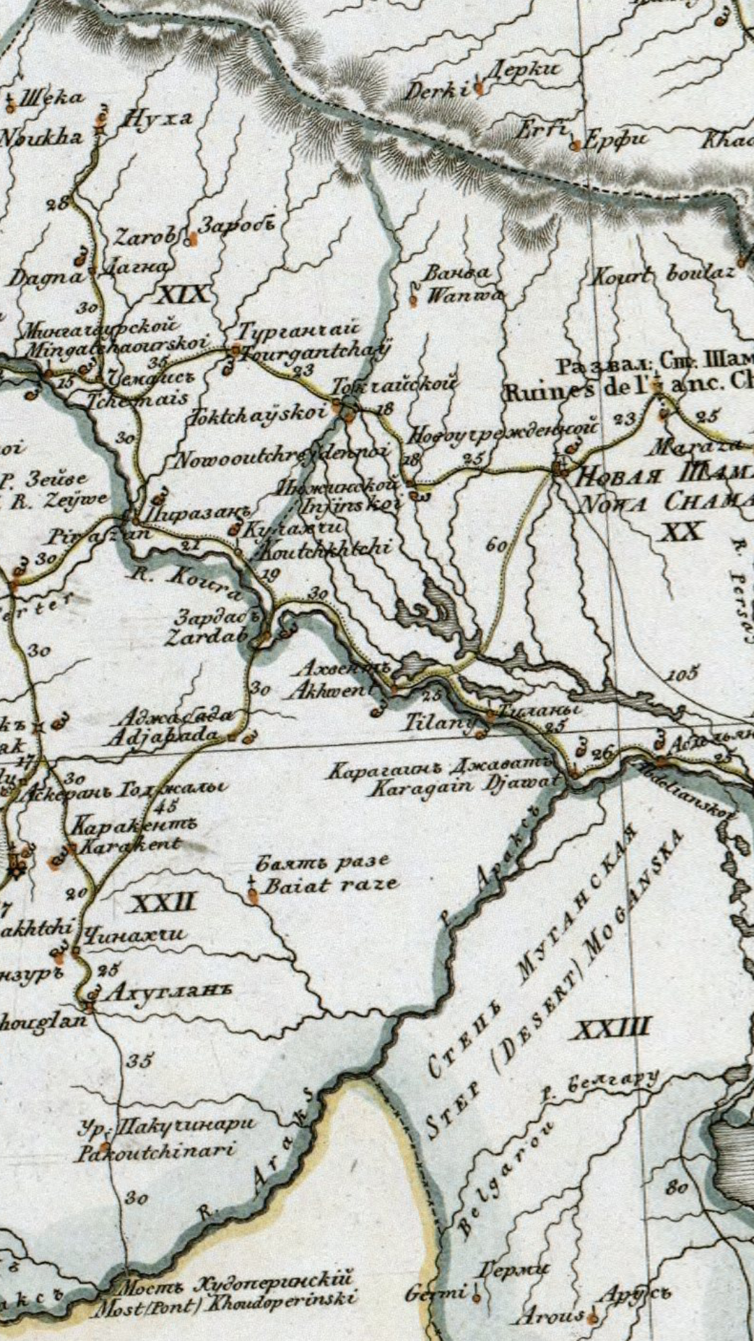 Qalaqayın. 1823-cü il.